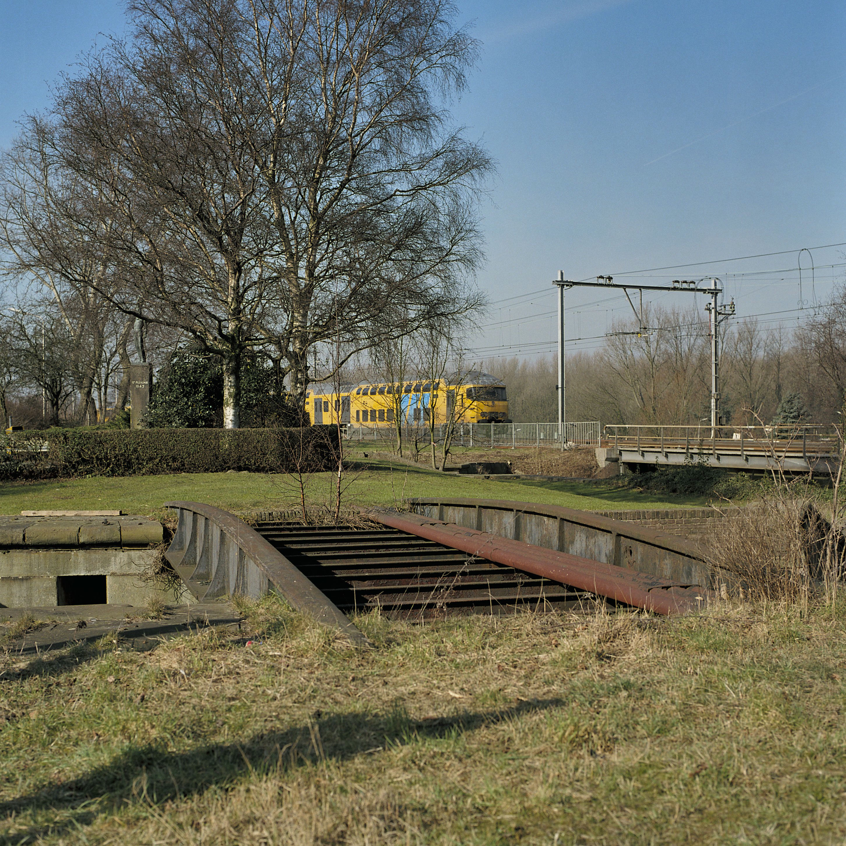 Overzicht oostelijke sluis met restant spoorbrug